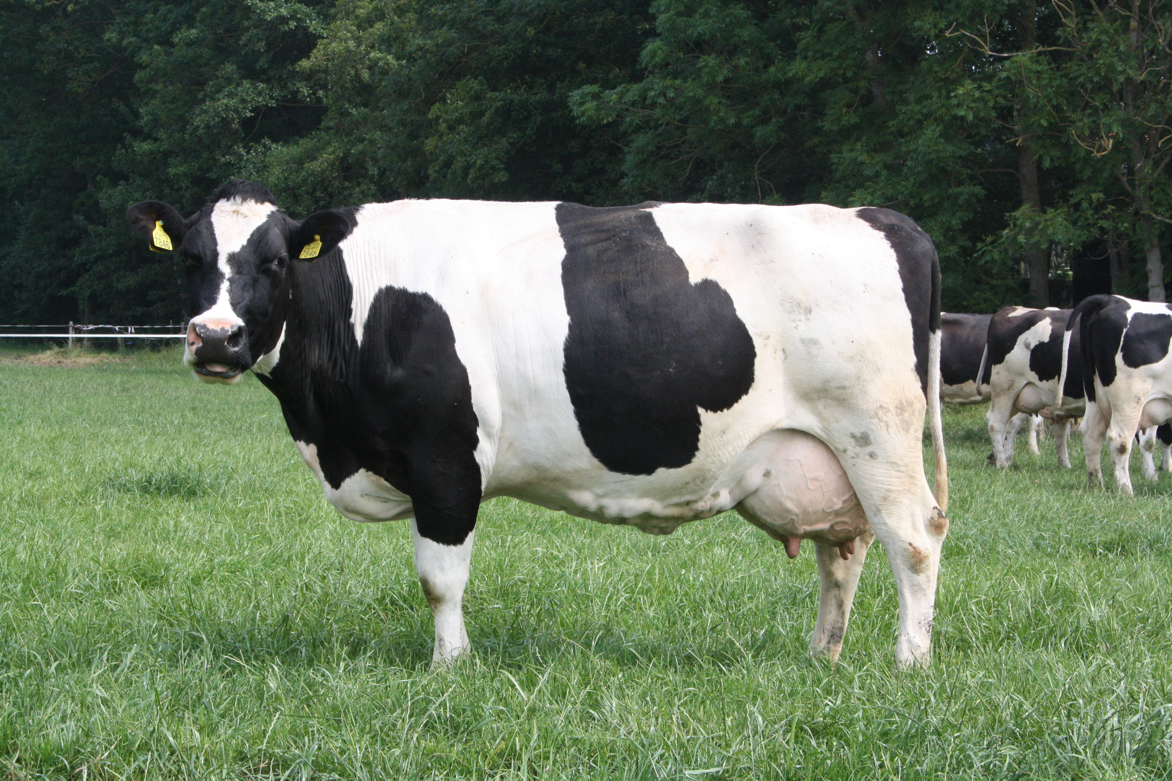 Cow, Dutch Friesian